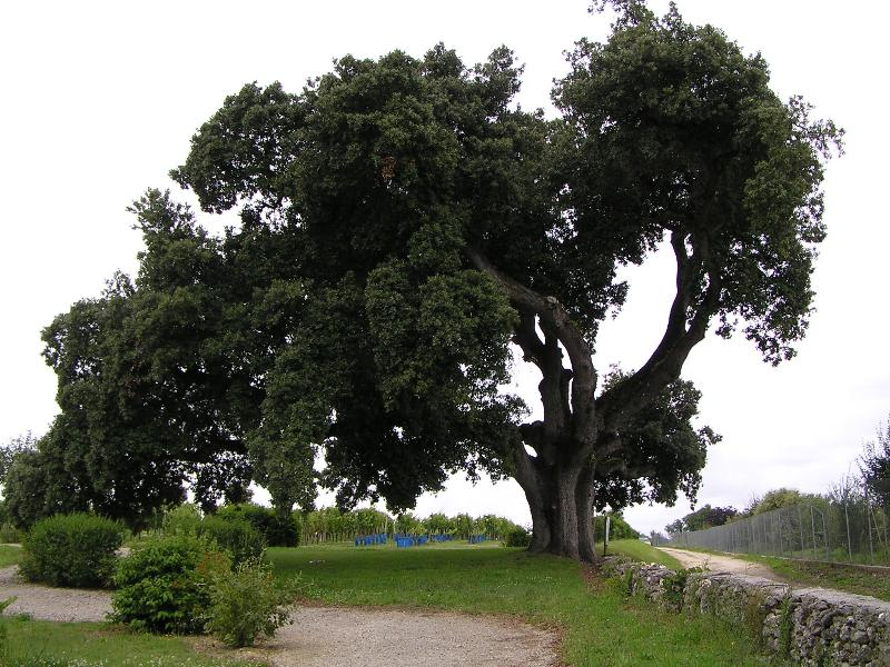 arbre remarquable : chêne vert à Cherves-Richemont, Charente.